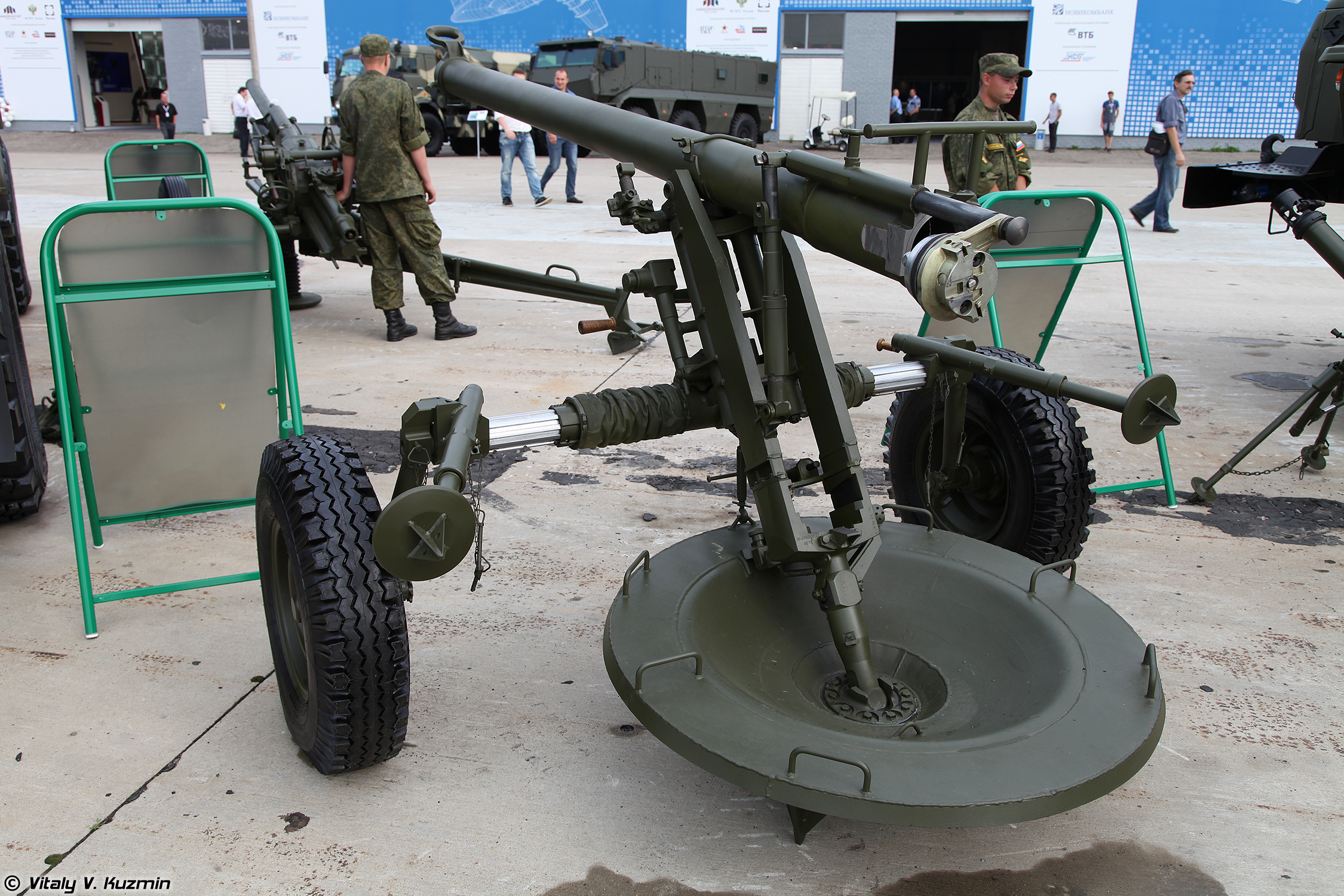 120-мм буксируемый миномет 2Б23 Нона-М1 (120mm mortar 2B23 Nona-M1)